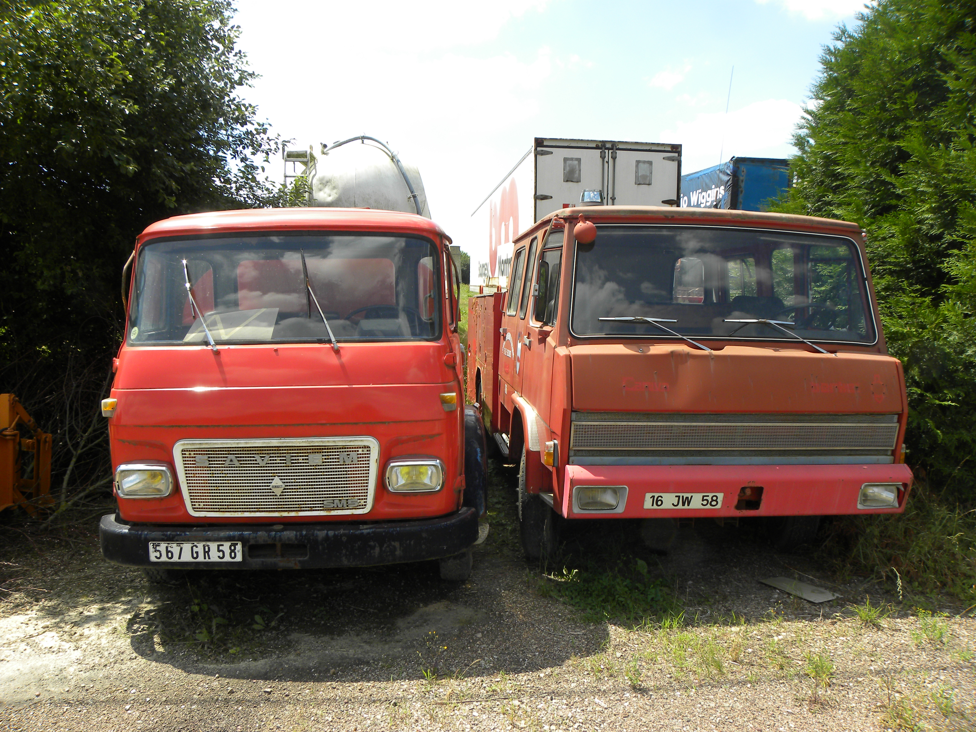 Saviem SM 5 and Berliet Camiva truck